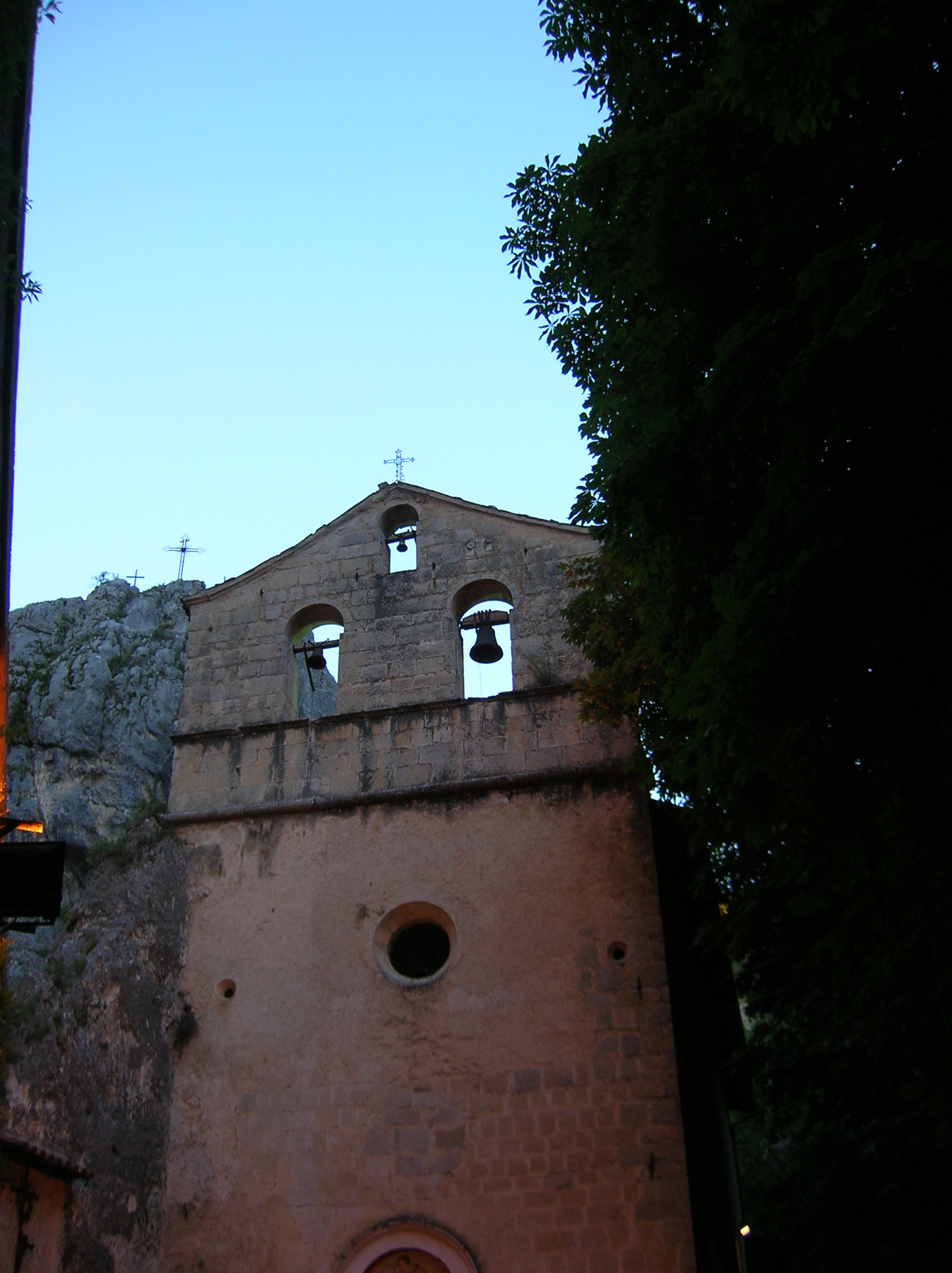 Santuario Madonna di Appari al crepuscolo